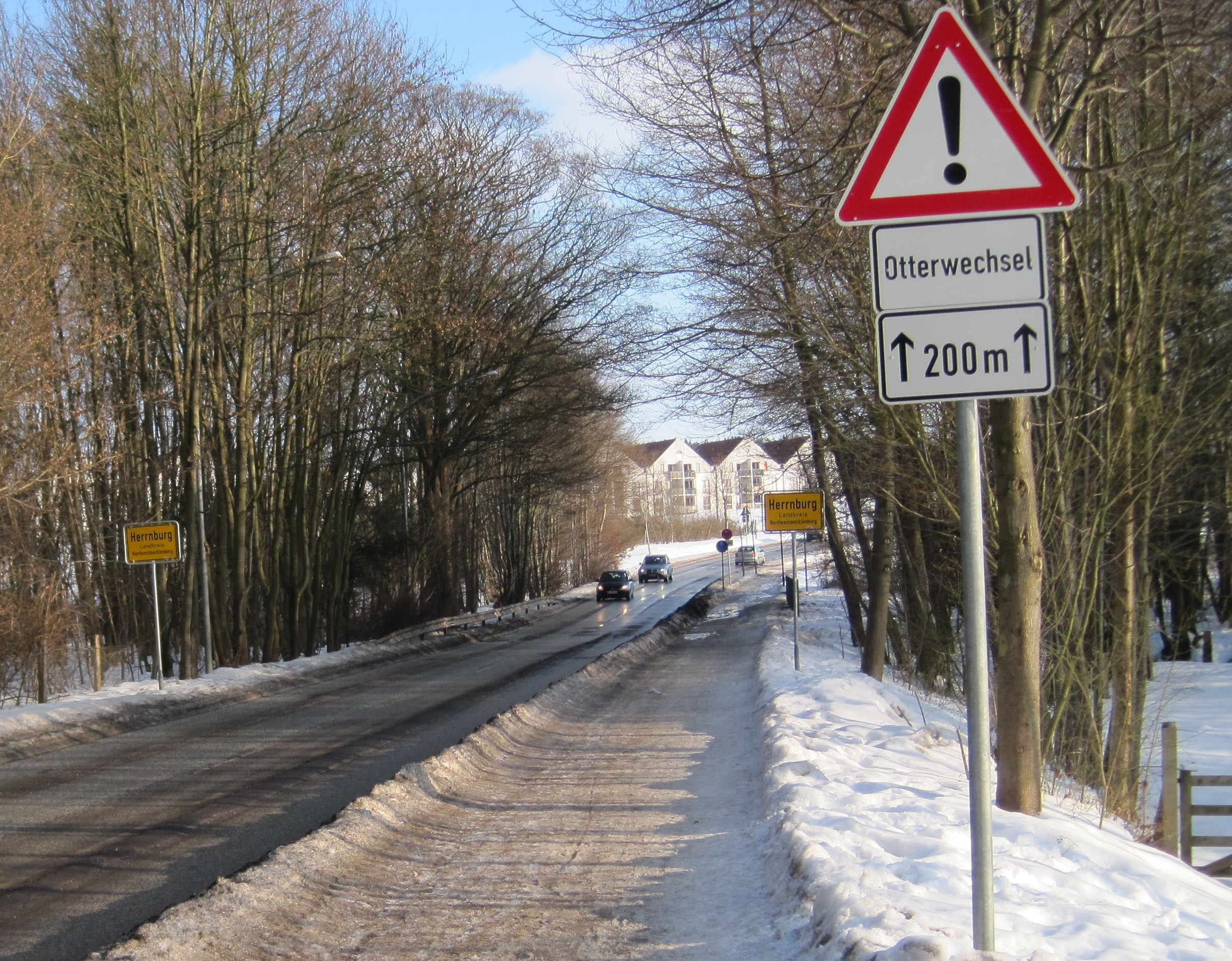 Warnschild vor der Brücke über den Lübecker Landgraben an der Brandenbaumer Landstraße in Lübeck (Grenze zu Mecklenburg-Vorpommern).